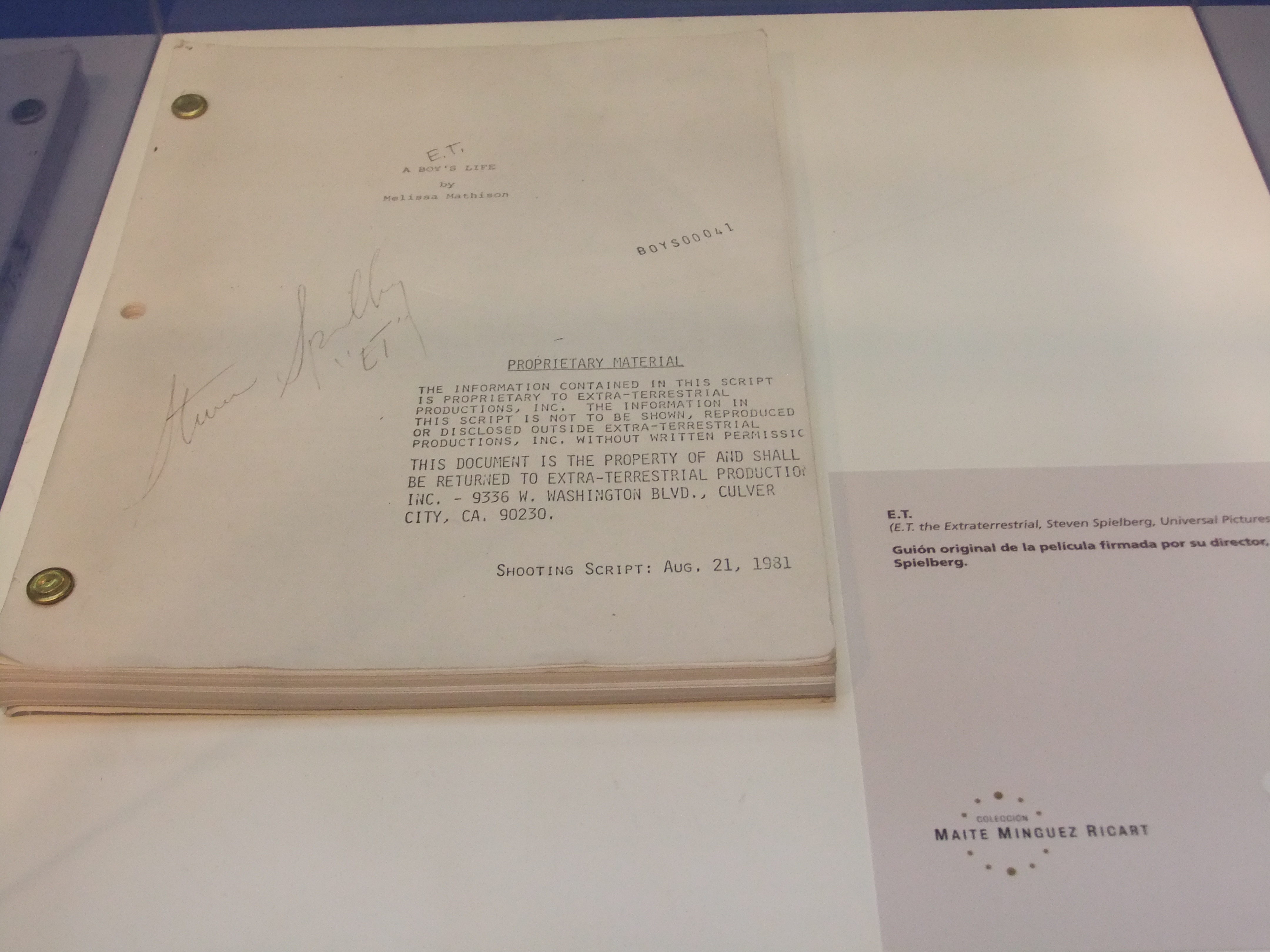 Guion original de E.T. firmado por Spielberg. Coleccion de Maite Minguez Ricart